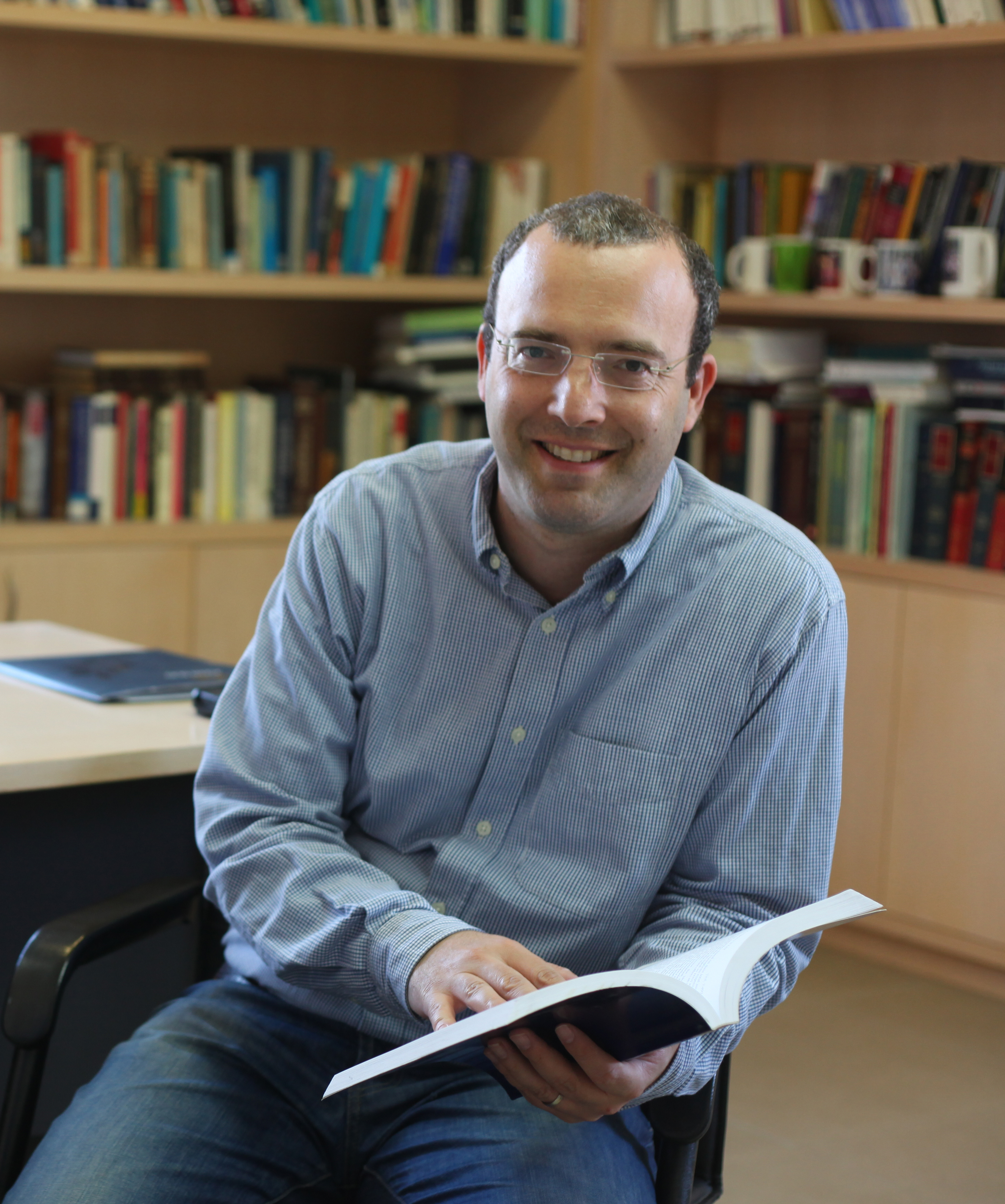 שרון חנס - משפטן ישראלי